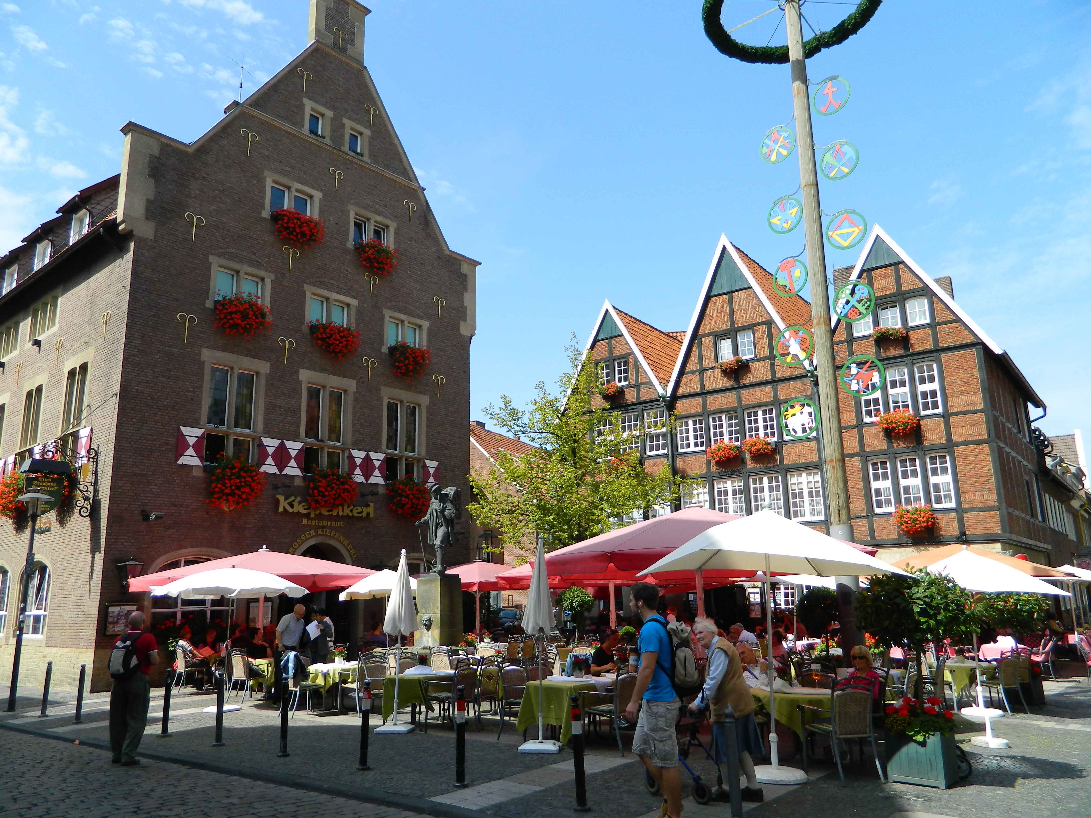 Platz rund um das Kiepenkerldenkmal, Spiekerhof, Münster